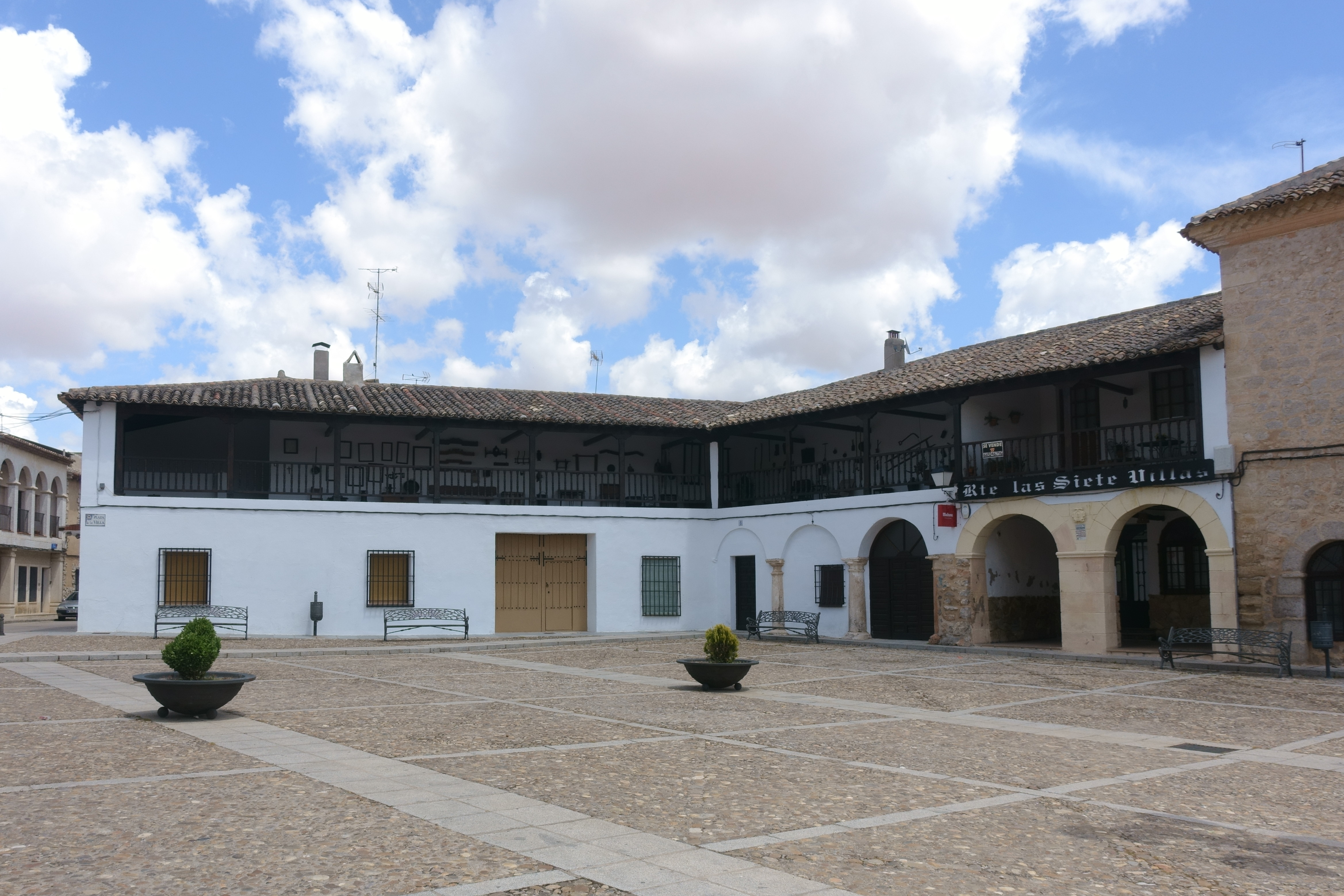 Museo local de Villamayor de Santiago (Cuenca, España).